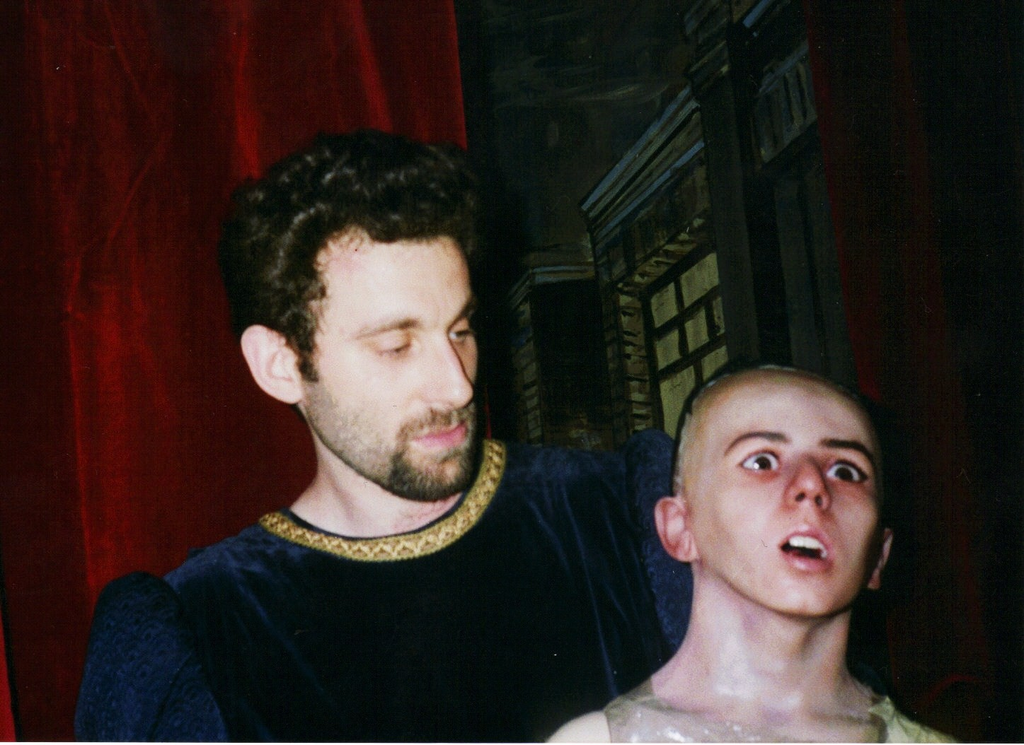 Benoît Lestang sur le tournage du film "Le Masque de cire"